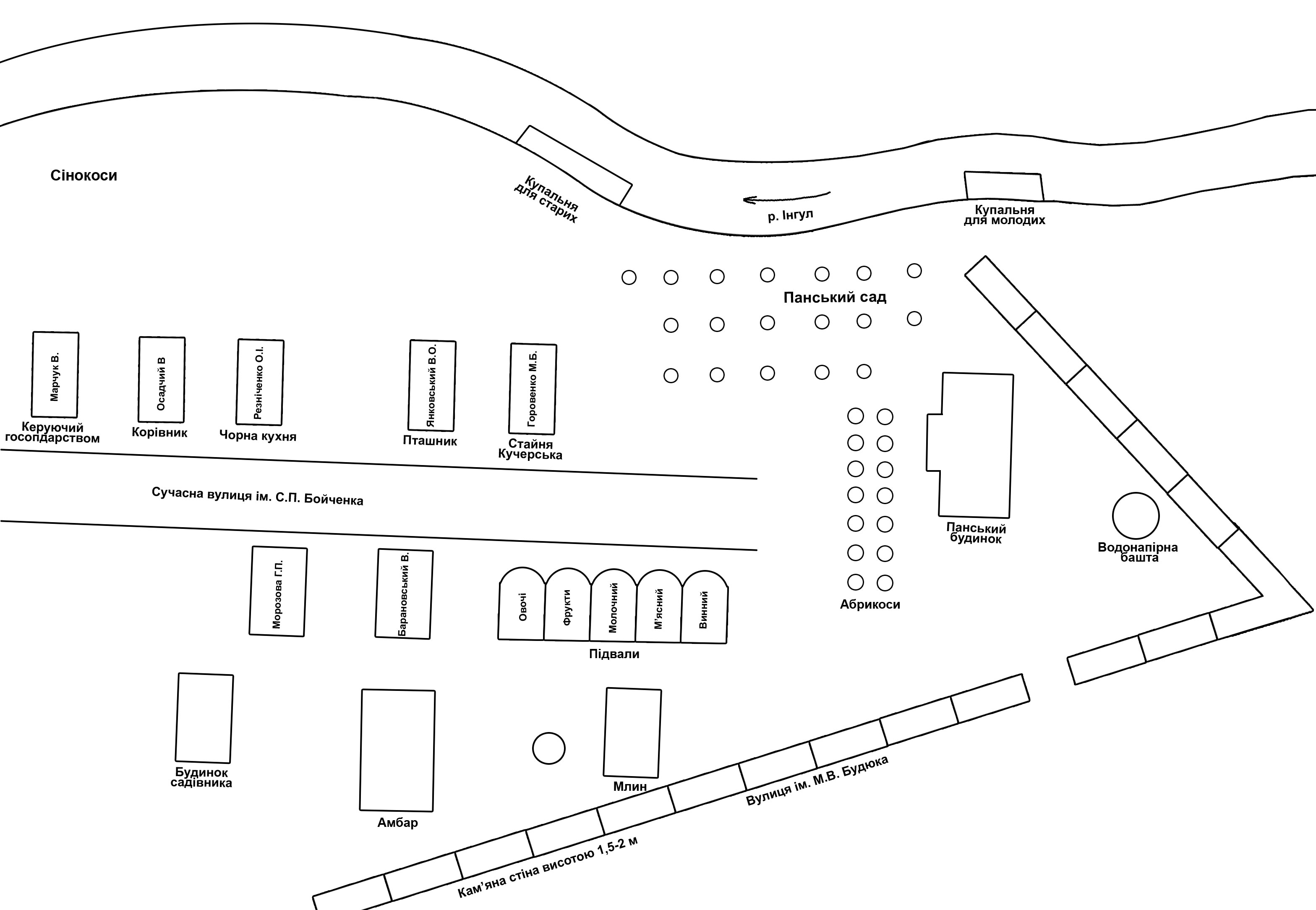 План панського маєтку в Мар'ївці